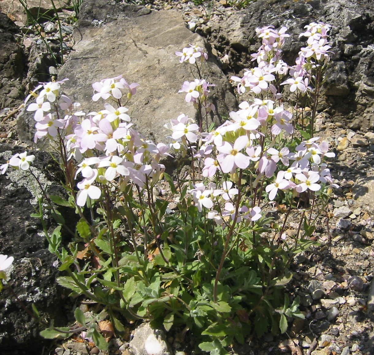 Arabis_alpina; Botanic Garden, Vienna, Austria.